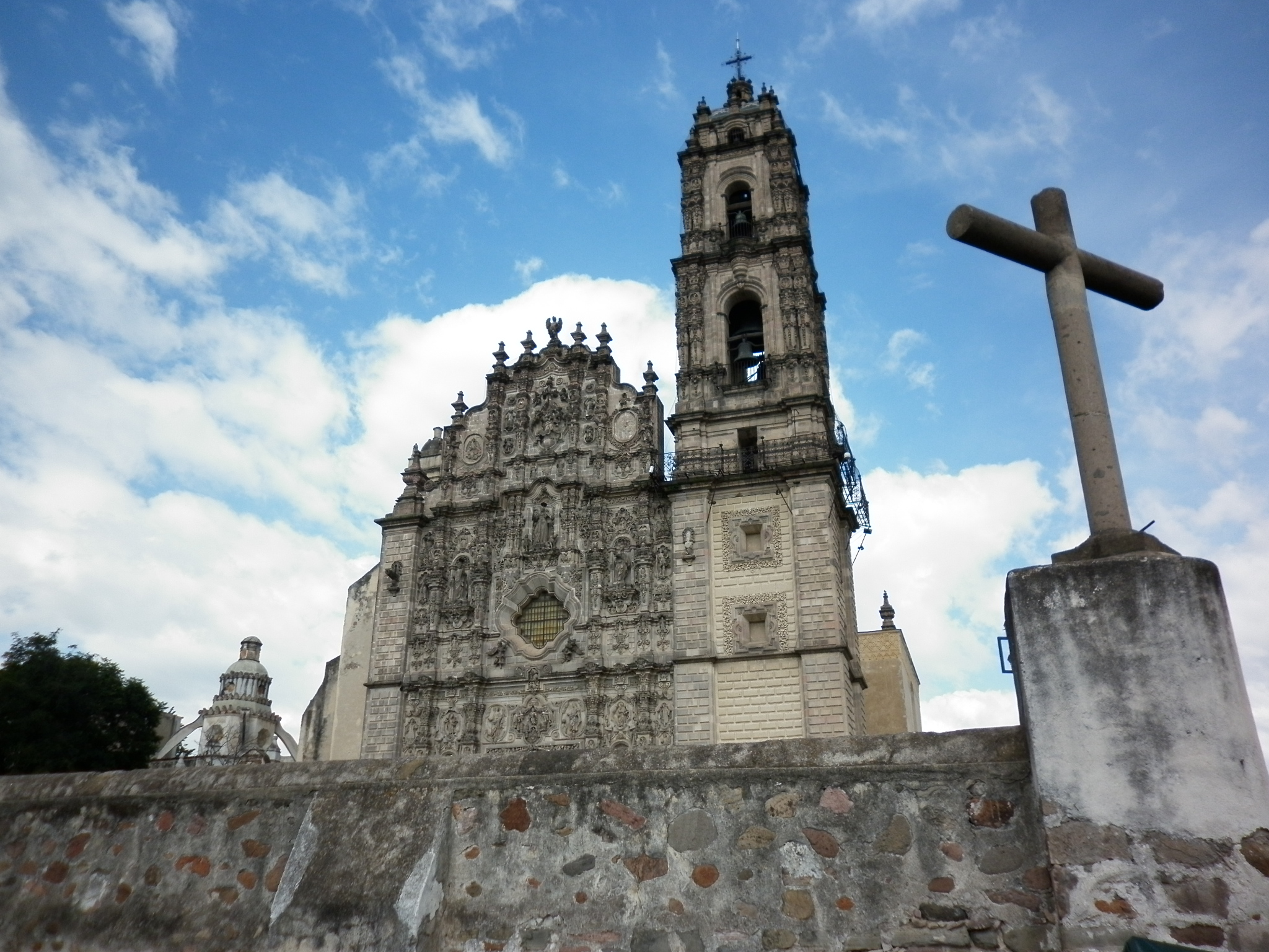 Tepozotlan